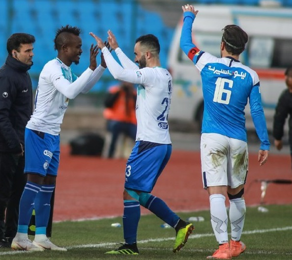 نخستین حضور گادوین منشا در لباس استقلال